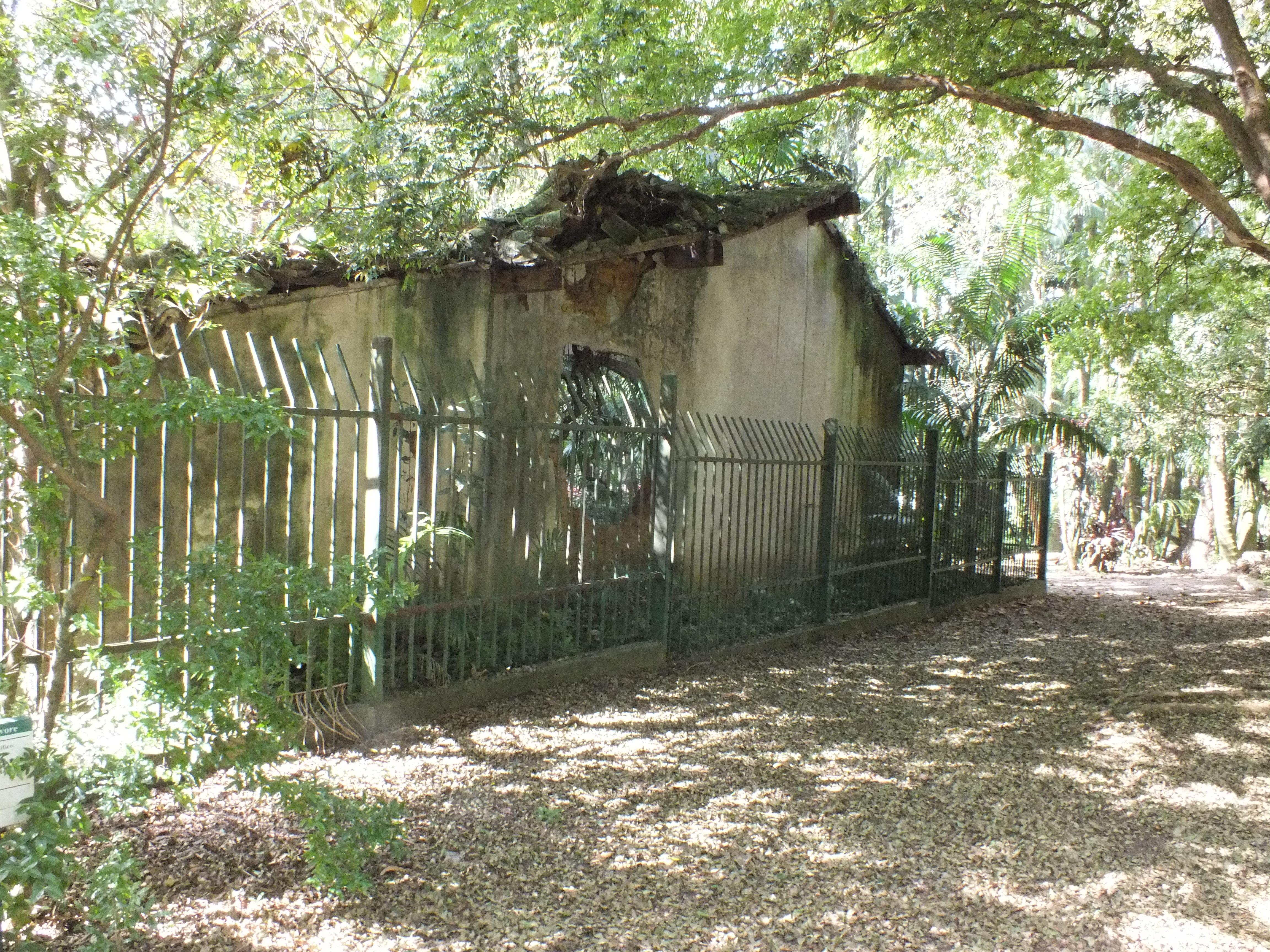 Construção datada do século XIX, a "Casa de Taipa e Pilão, se encontra próximo à área central do Parque Burle Marx, localizado no Panamby. O edifício era utilizada durante o Ciclo Bandeirista em São Paulo.